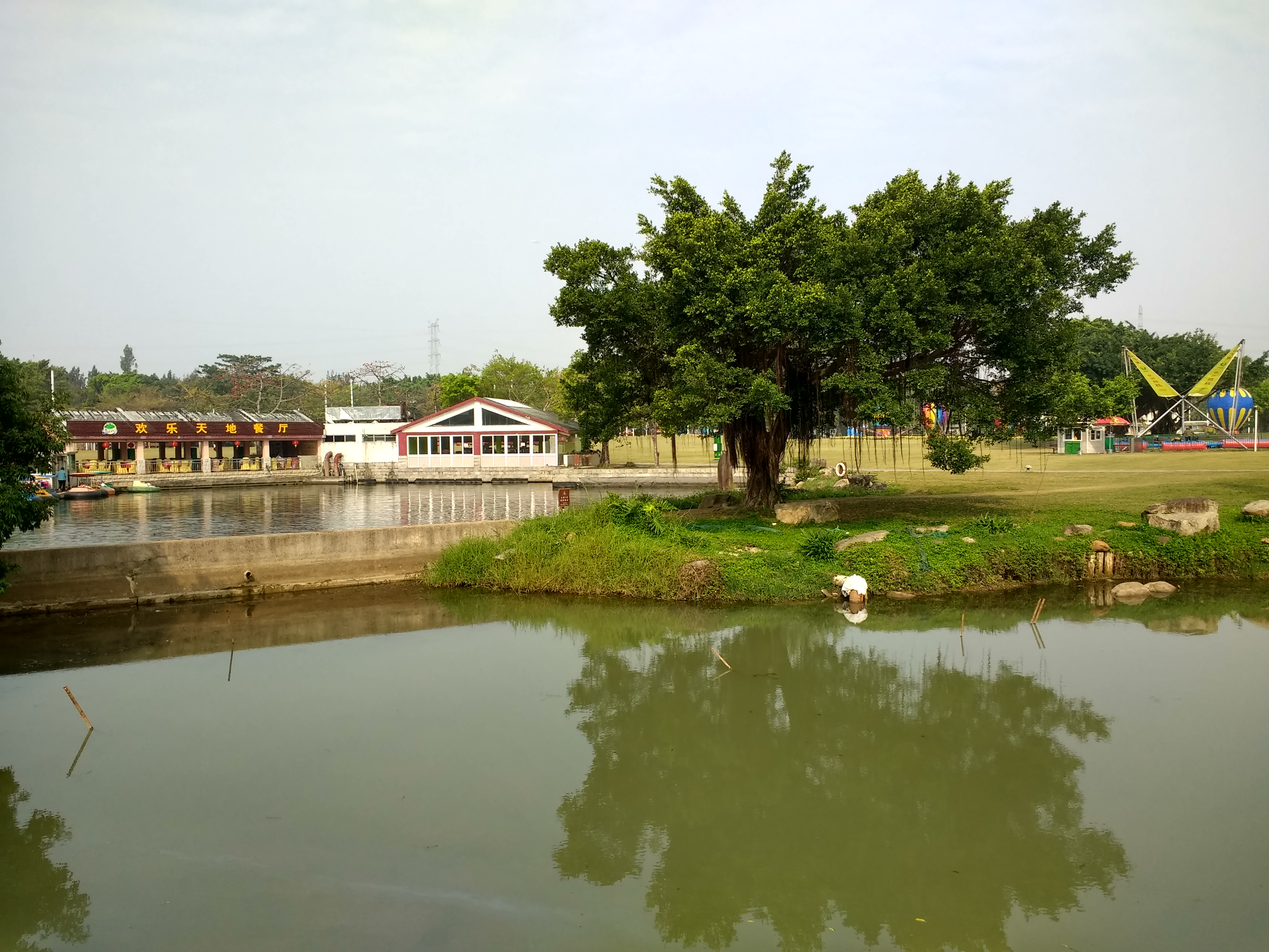 深圳海上田园